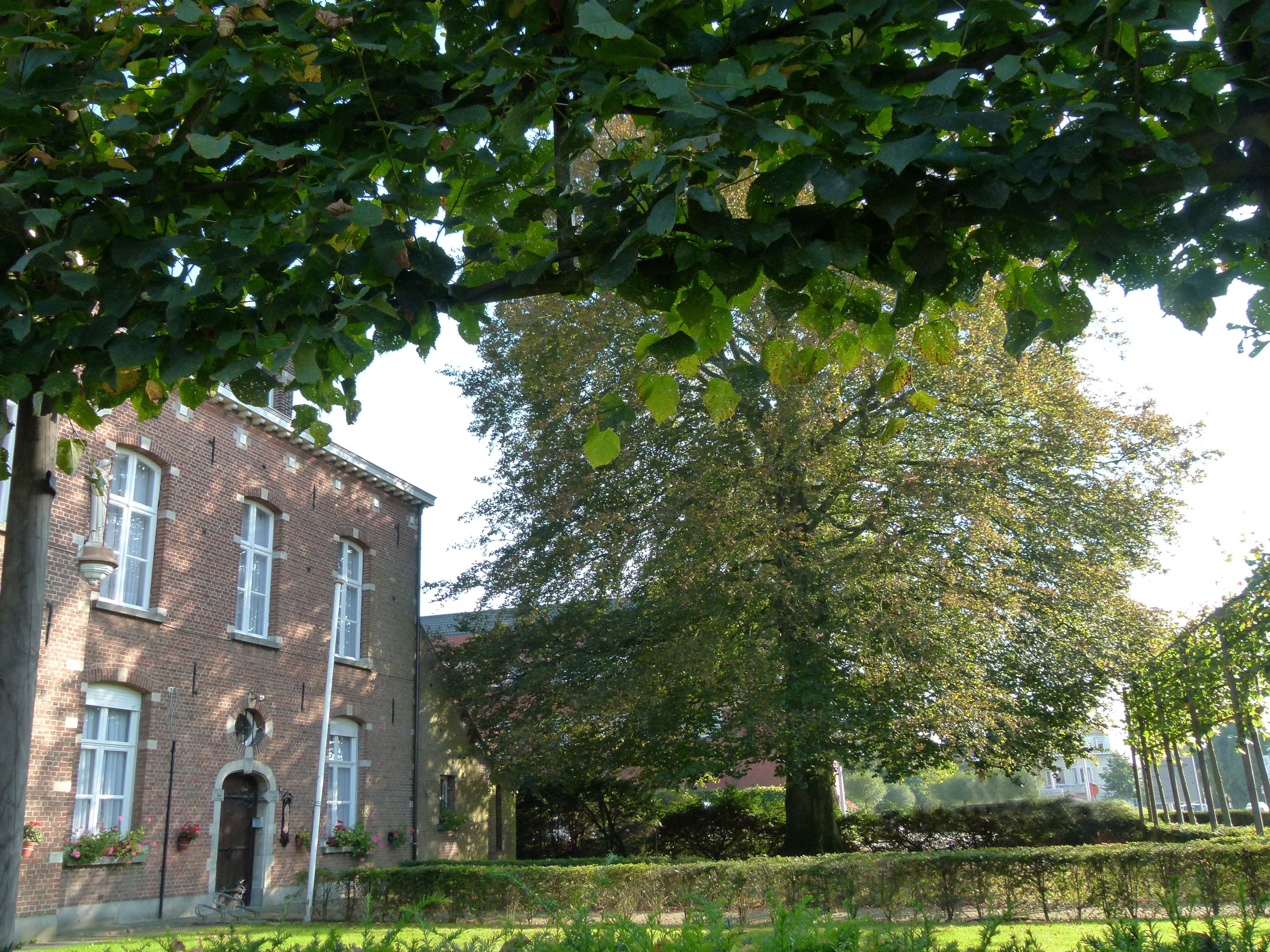 Nummer 23. Zogenaamd "Pastorie van Sint-Cordula". Opklimmend tot 1806, namelijk benedenverdieping van de rechter vleugel en vergroot in 1868 sq., namelijk bovenverdieping van de rechter vleugel en volledige linker vleugel, onder leiding van architect E. Gife; in 1881 werd de voorgevel bepleisterd en circa 1925 voorzien van nieuwe gevelbekleding. Bron: Plomteux G., Steyaert R. & Wylleman L. 1985: Inventaris van het cultuurbezit in België, Architectuur, Provincie Antwerpen, Arrondissement Antwerpen, Bouwen door de eeuwen heen in Vlaanderen 10N3 (Ru-Z), Brussel - Gent. Auteurs: Plomteux, Greet